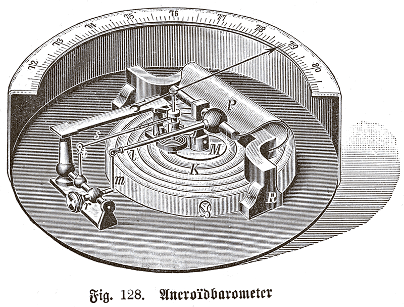 aneroid barometer